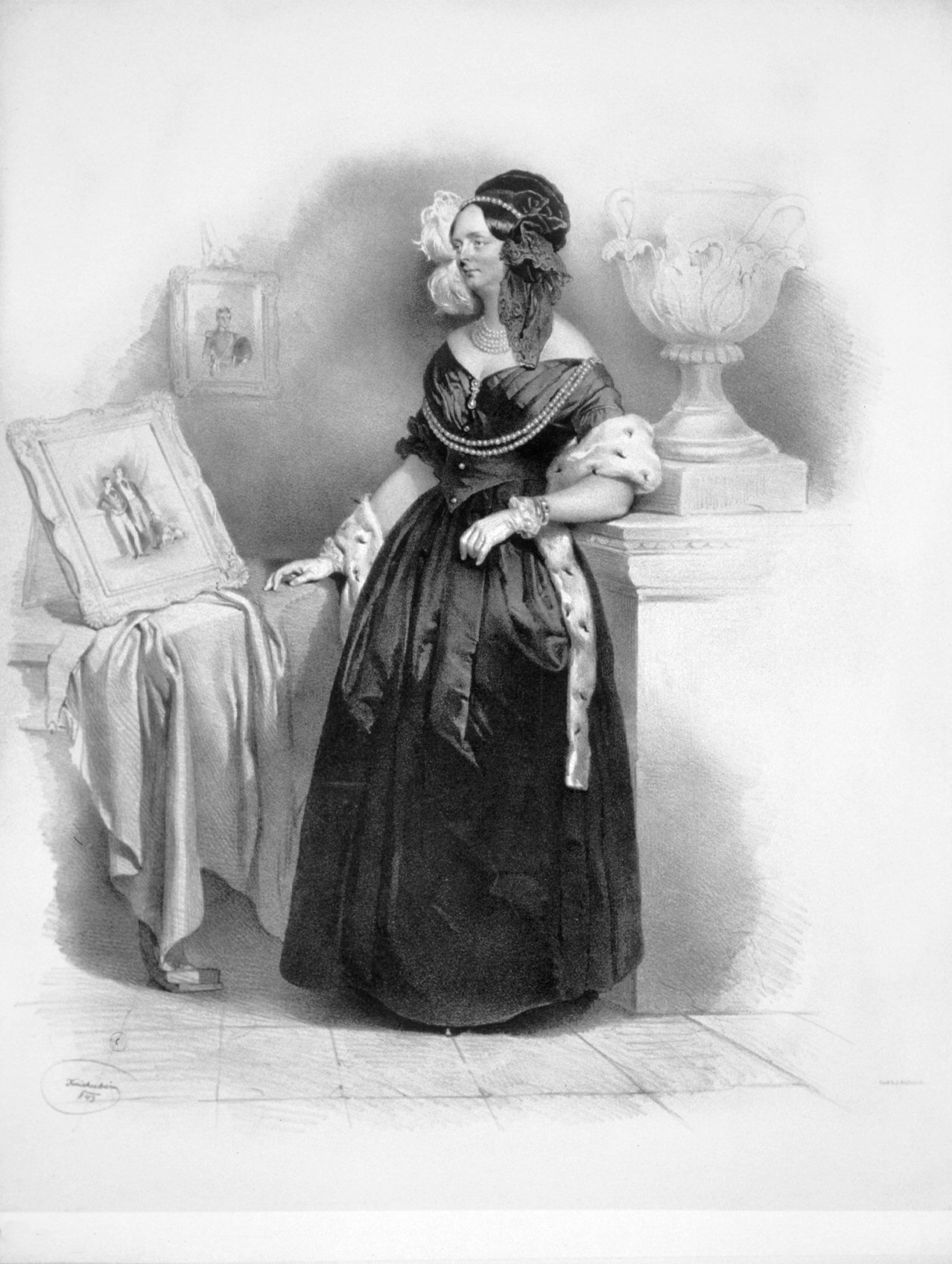 Elisabeth Anna Russell, geb. Rawdon (+ 1874) Ehefrau von George William Russell (Diplomat). Lithographie von Josef Kriehuber, 1843